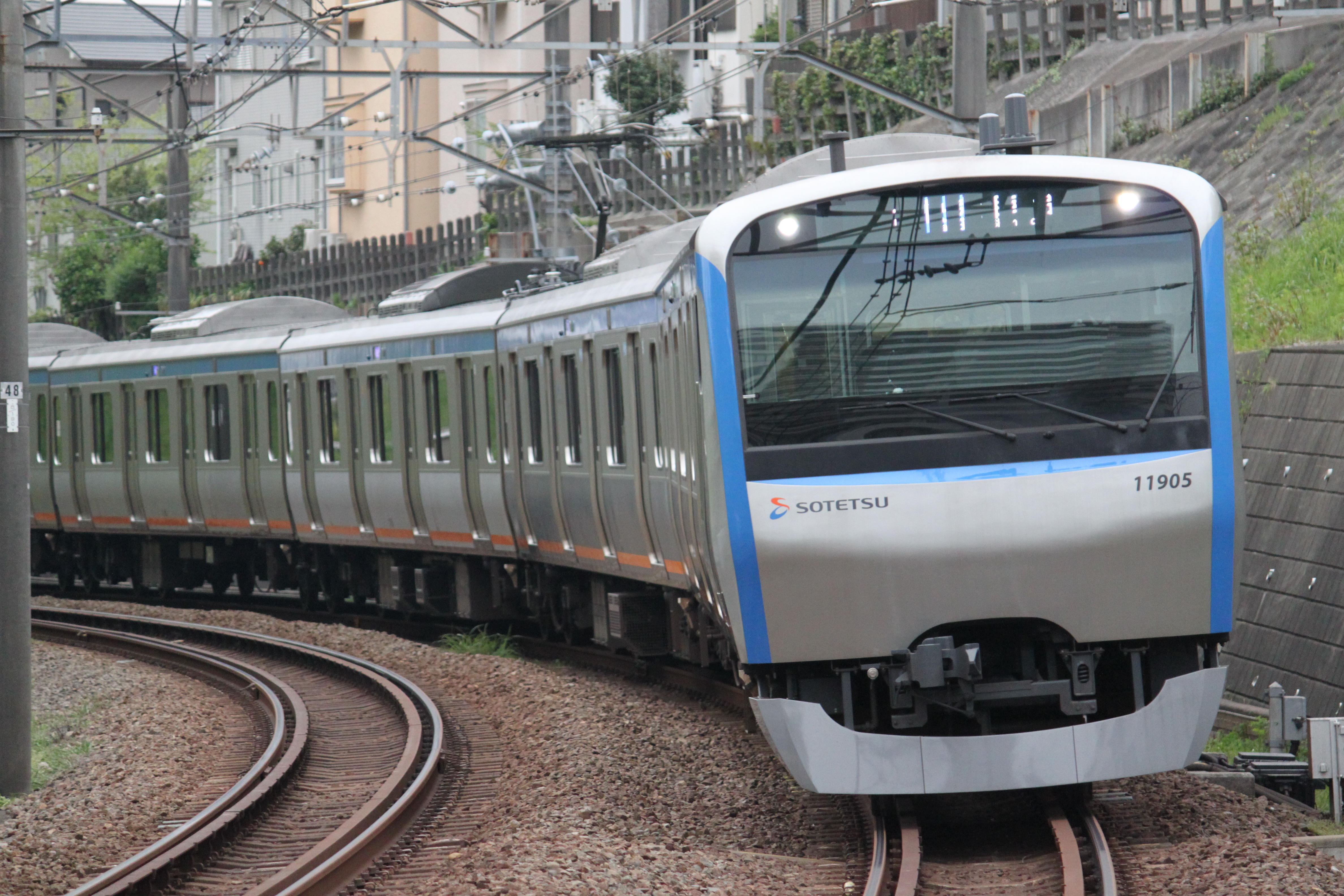 相模鉄道11000系電車